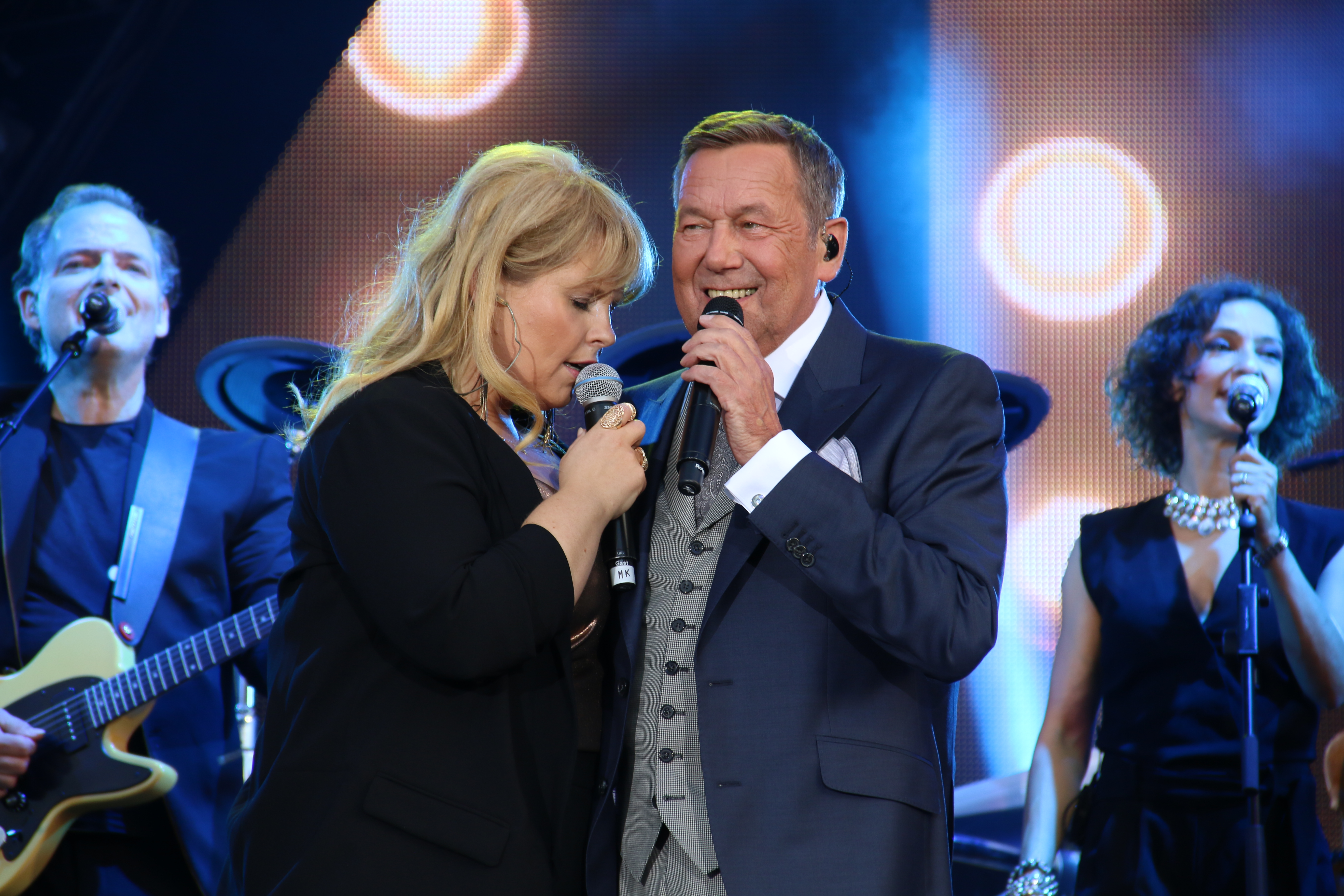 Roland Kaiser und Maite Kelly beim Konzert am Dresdner Elbufer (Kaisermania 2016); 29. Juli 2016